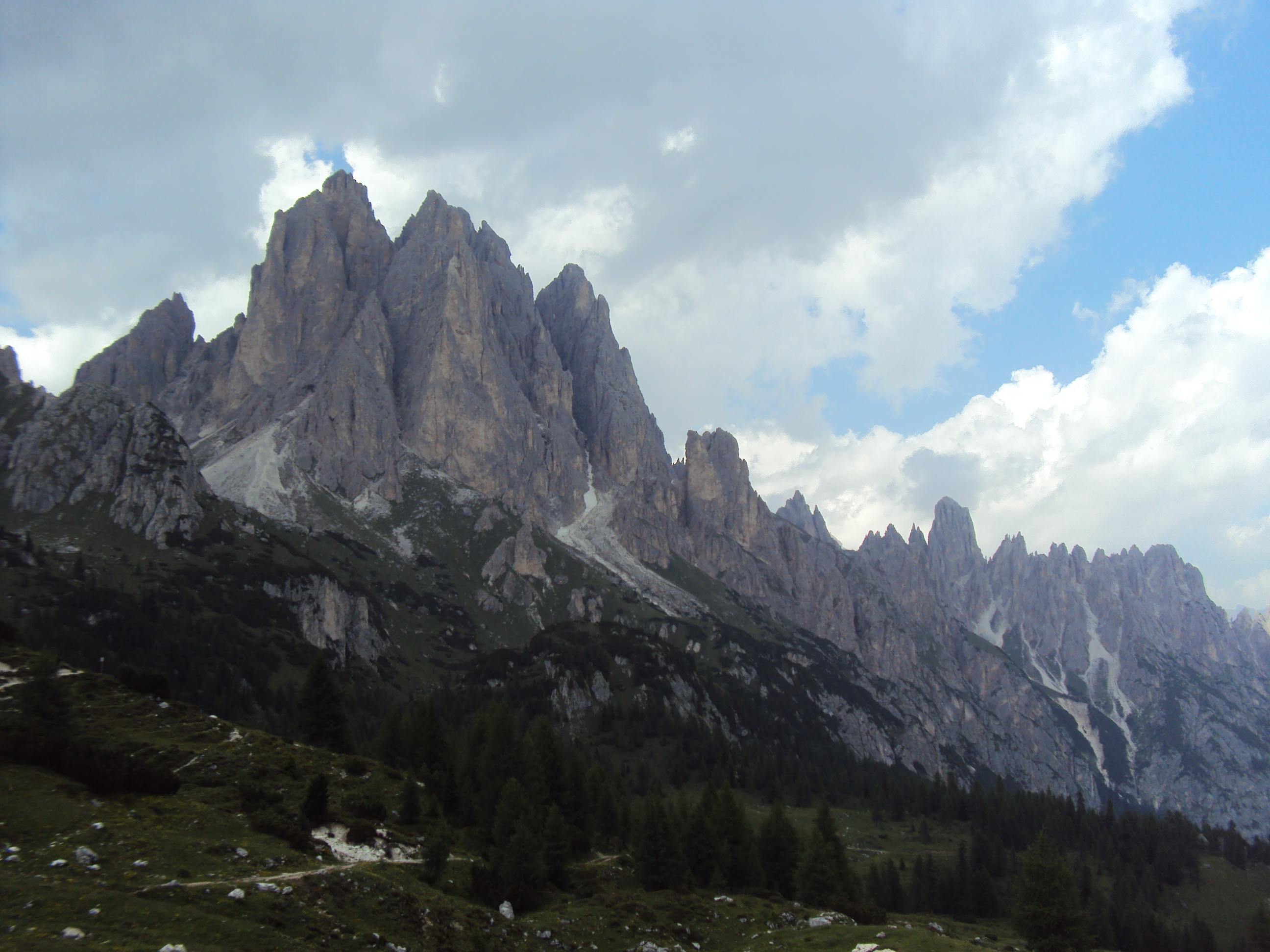 Cadini di Misurina